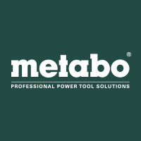 Neues Metabo Logo 2014 mit dem Claim "Professional Power Tool Solutions".